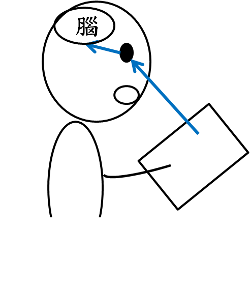 中文（台灣）: 速讀──眼腦直映